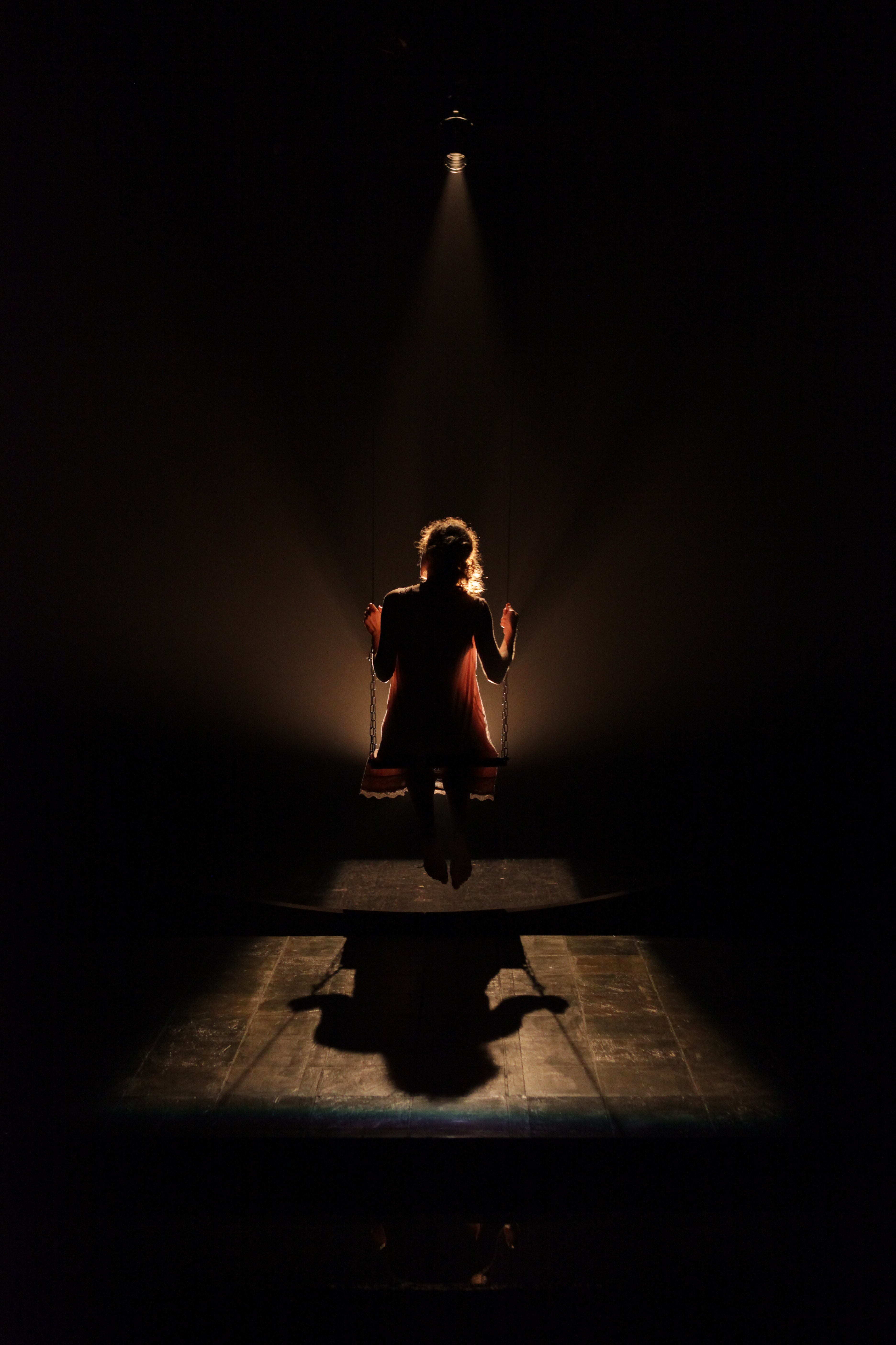 מולי סווני תיאטרון החאן בימוי ג'יטה מונטה צילום ויטלי פרידלנדר (1)